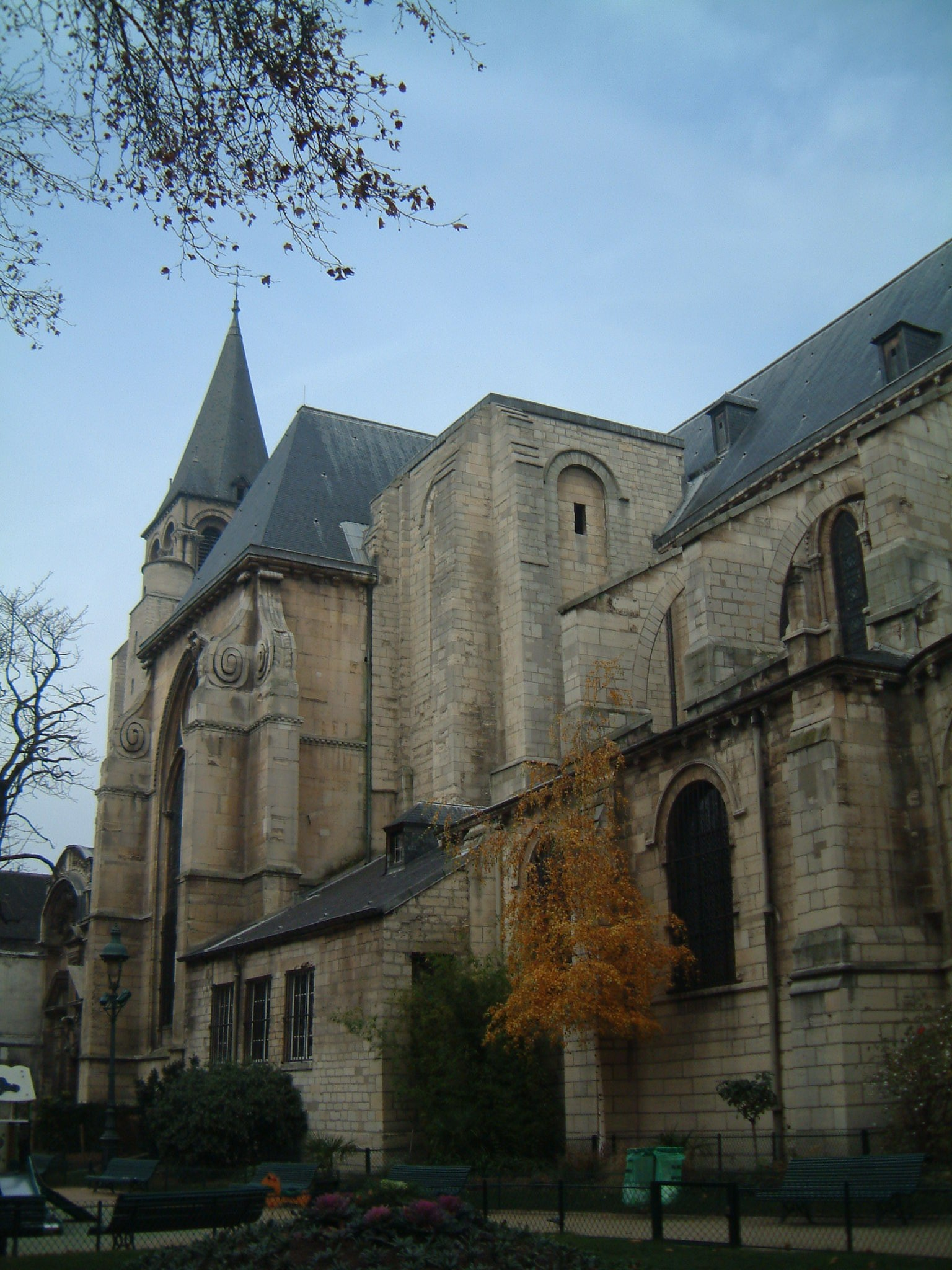 Saint-Germain-des-Prés from south